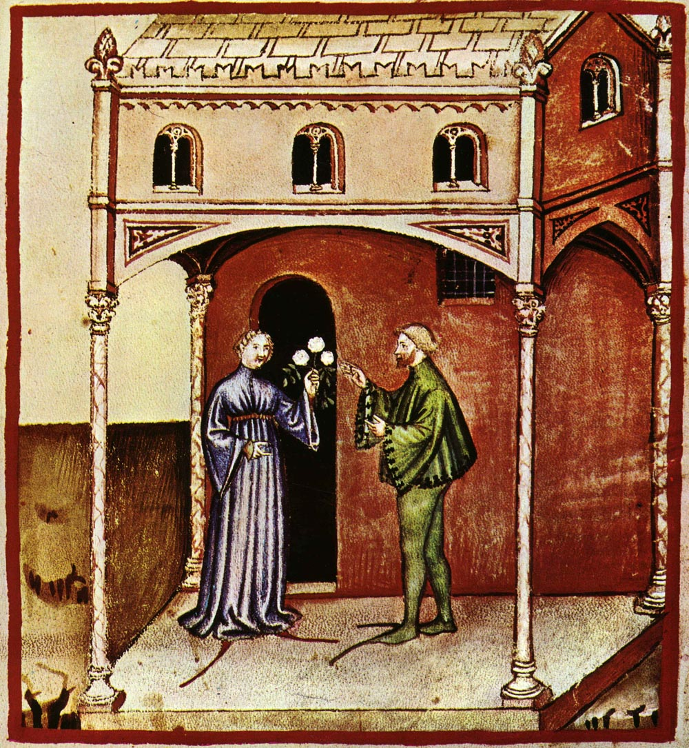 Tacuina sanitatis (XIV century) 4-aspetti di vita quotidiana, stagione calda,Taccuino Sanit